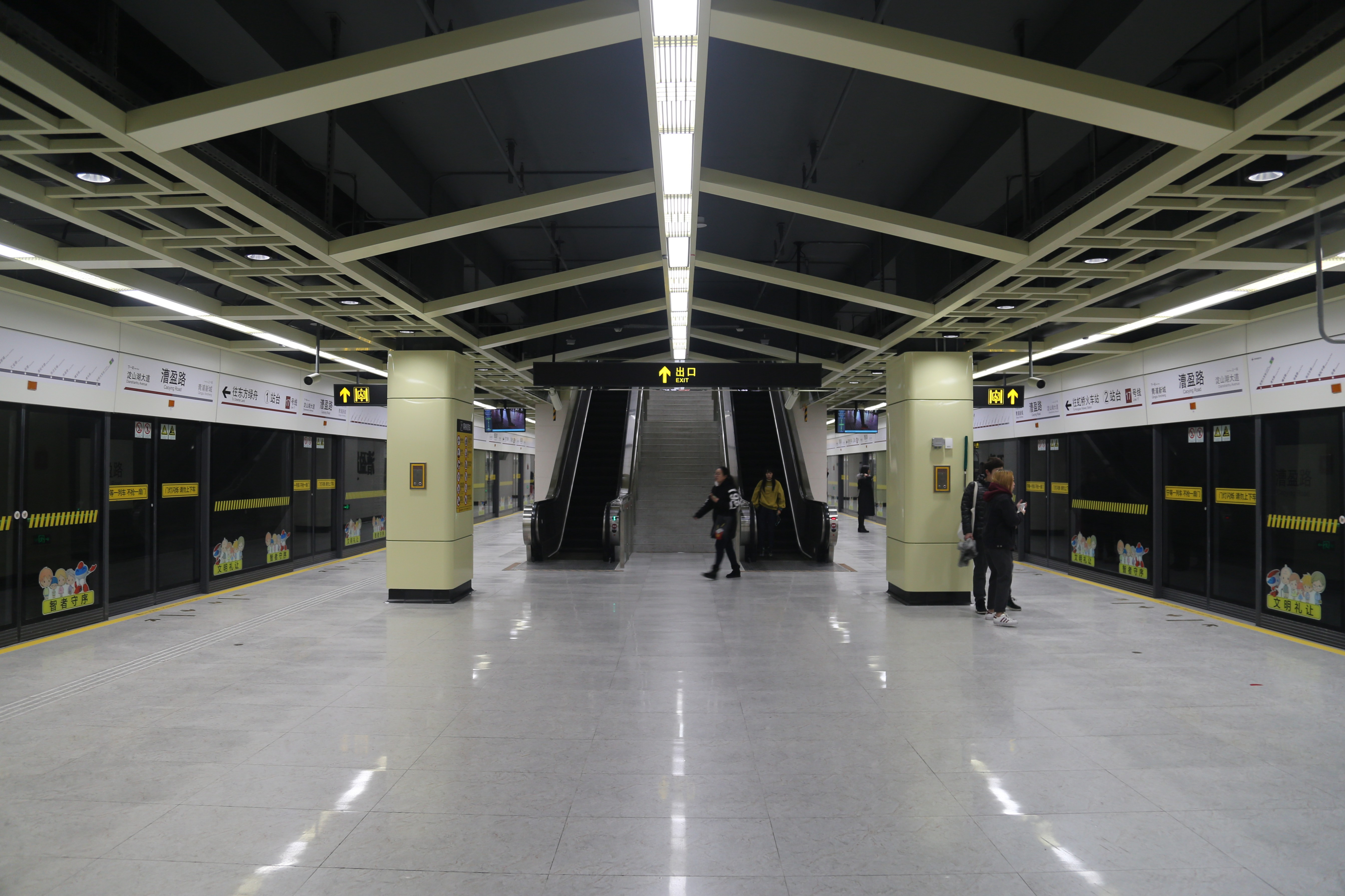 漕盈路站站台